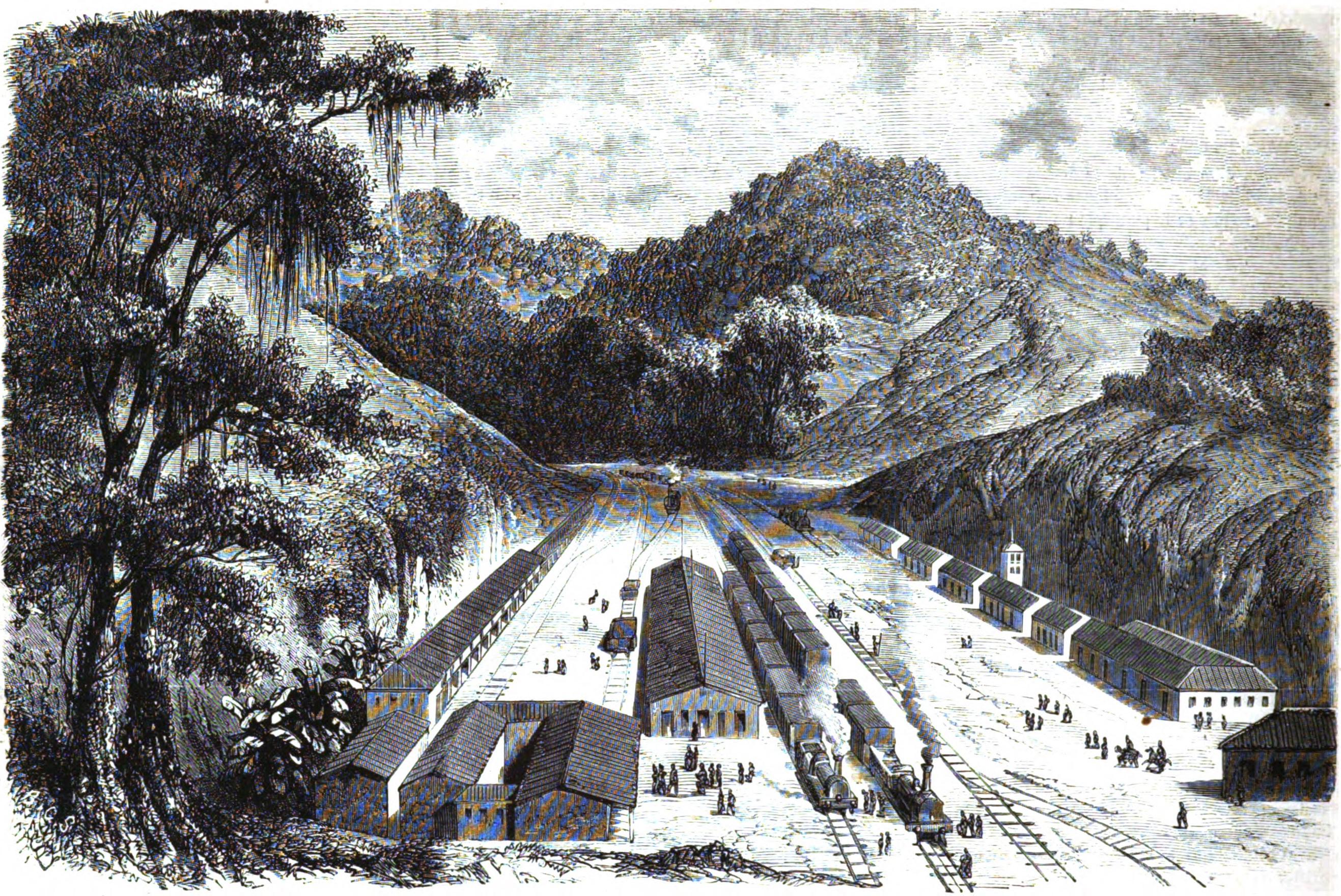 Inauguration de chemin de fer Pedro II (Brésil). — Vue de la Vallée des Macacos. — D'après un croquis de M. D..., officier de marine.